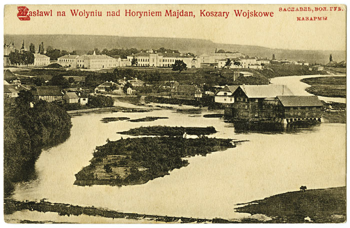 Заслав на Волині. Військові казарми. Поштівка видана накладом В. Чарнецького.